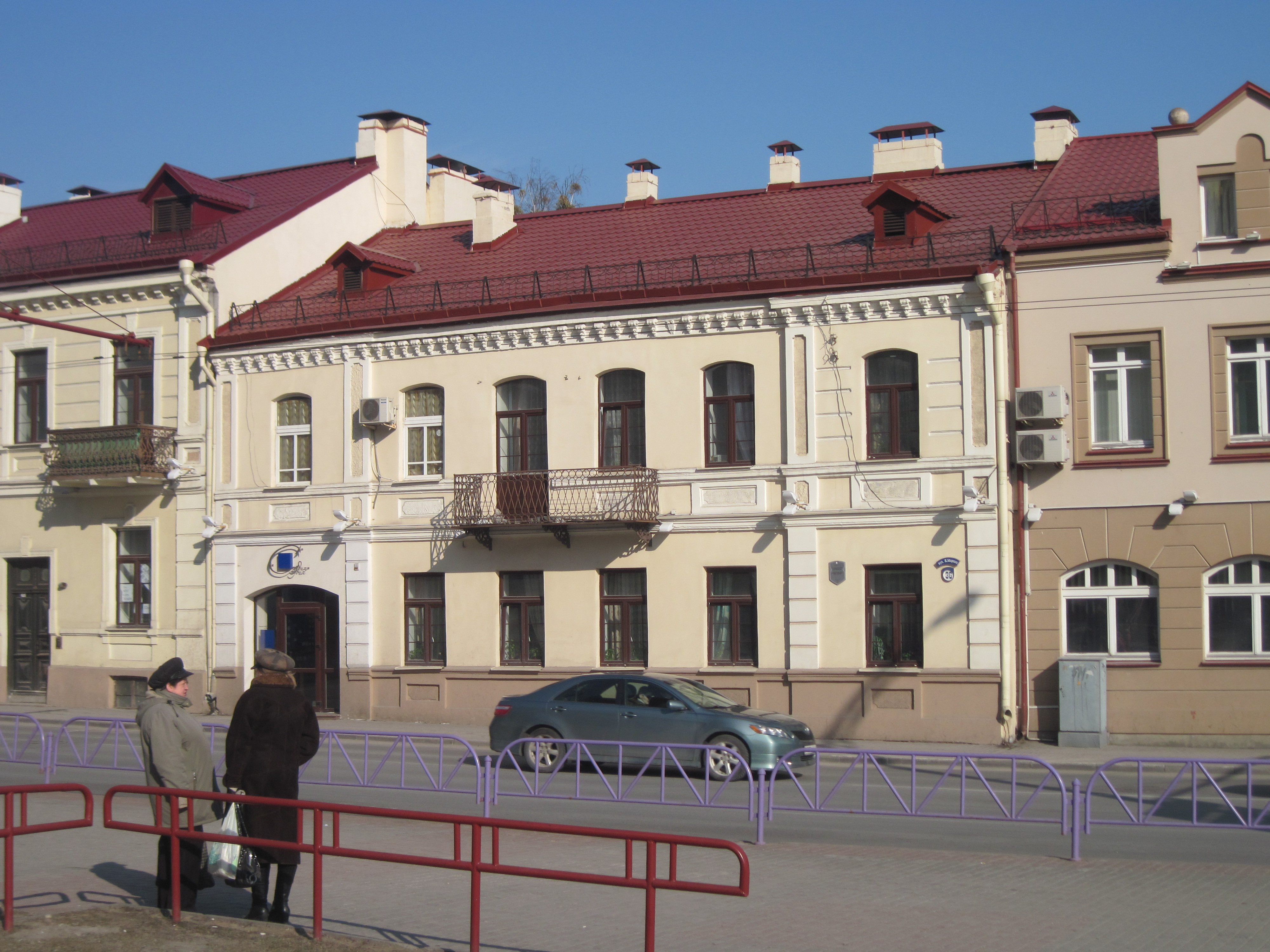 Беларуская (тарашкевіца): Забудова гістарычнага цэнтра Гродна. Вуліца К. Маркса, 36